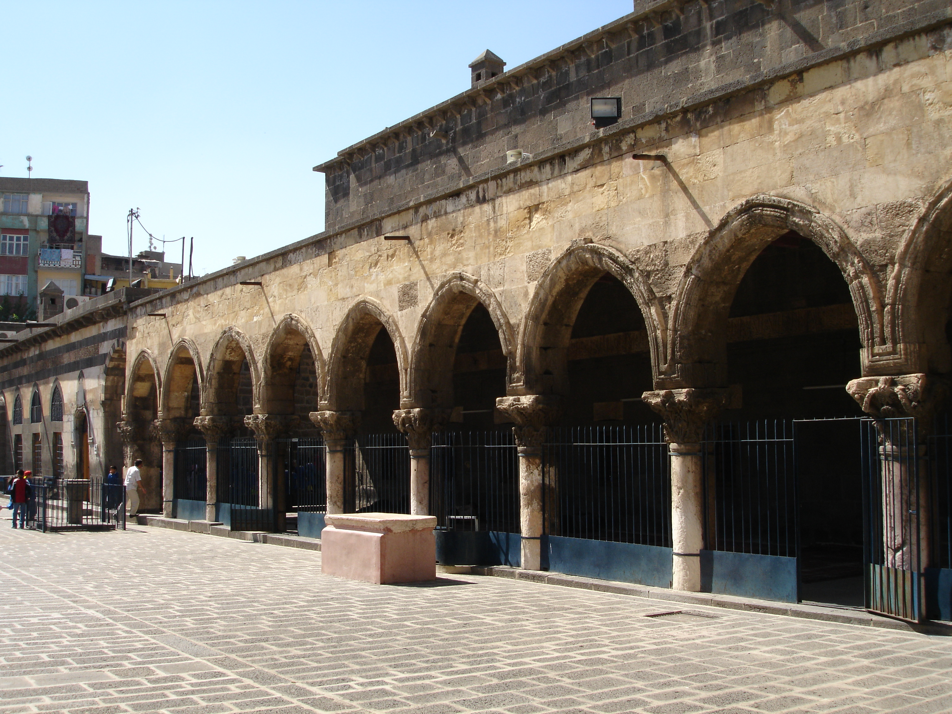 Diyarbakır Ulu camisini iç avlusundan bir görünüm